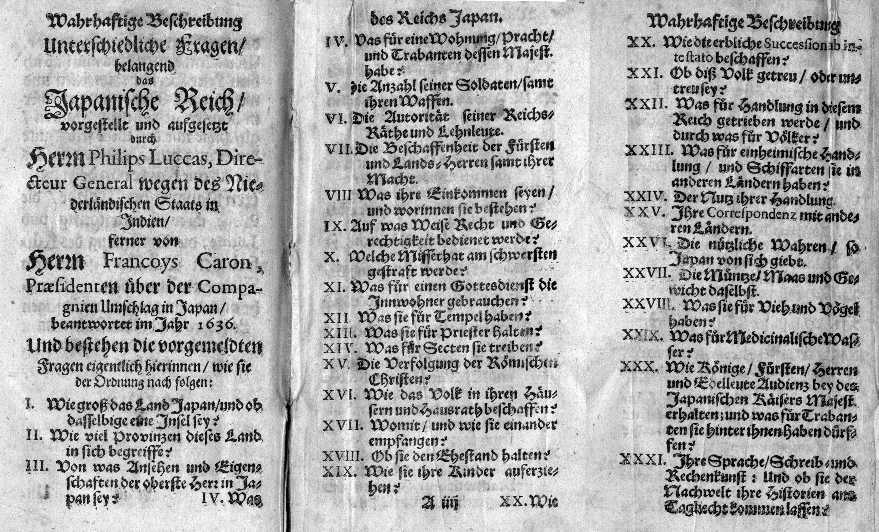 Fragen des Generaldirektors der Niederländischen Ostindien-Kompanie Philip Lucasz. an François Caron in Hirado zu Land und Leuten in Japan. Deutsche Übersetzung.